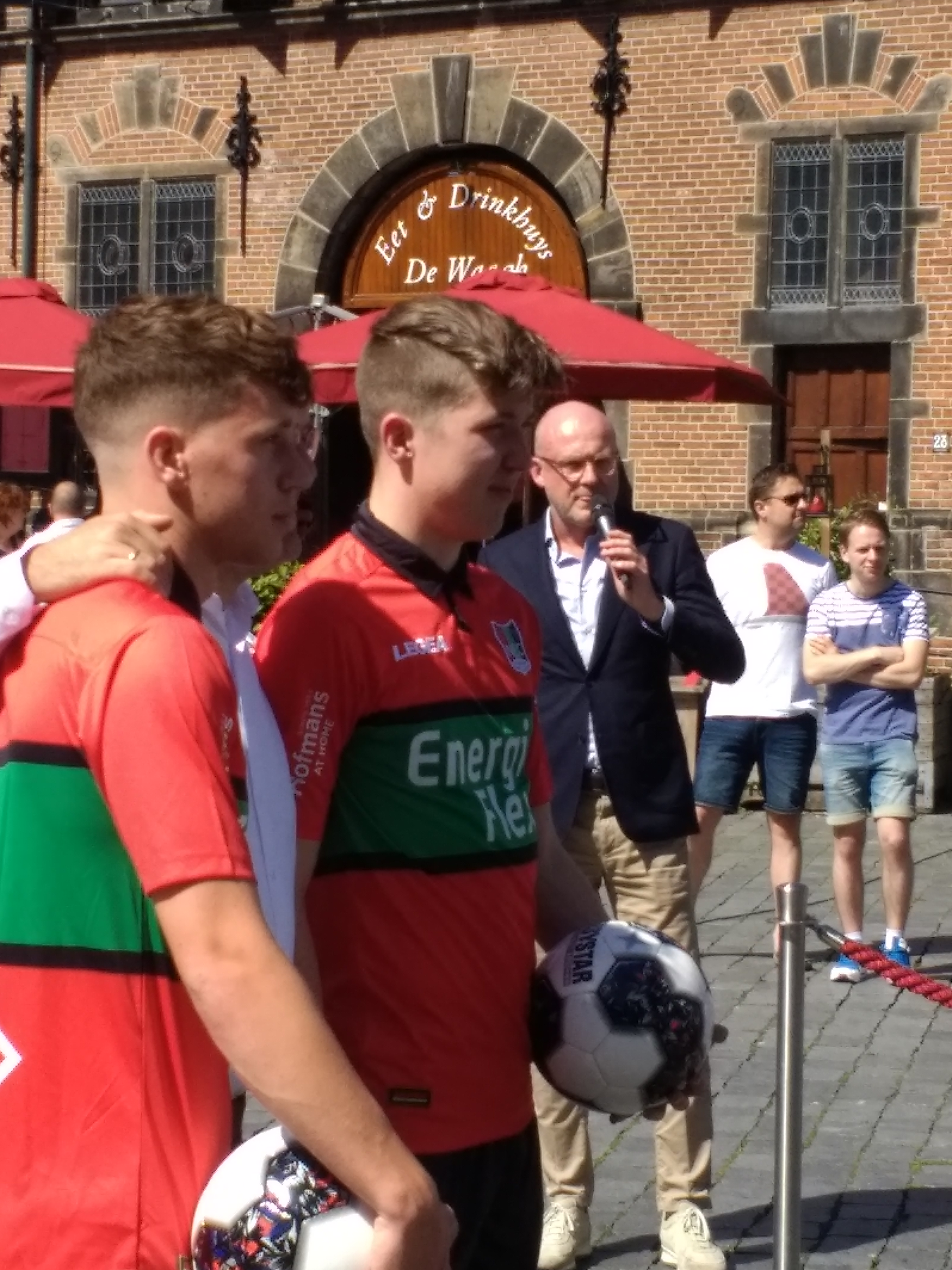 NEC spelers Frank Sturing en Ole Romeny en algemeen directeur Wilco van Schaik op de Grote Markt in Nijmegen bij de presentatie van shirtsponsor EnergieFlex en huurling Achahbar.